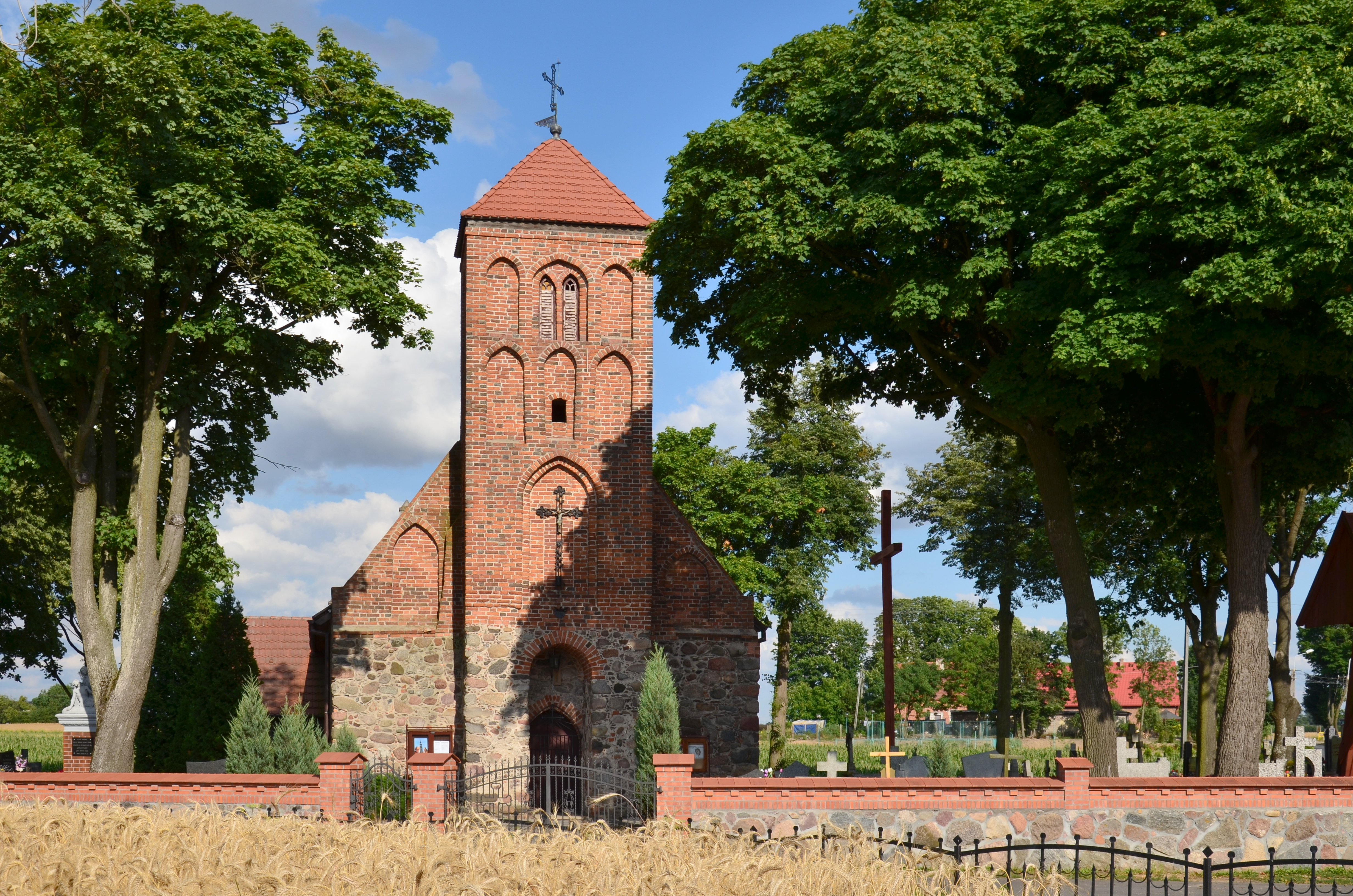 Gorczenica, kościół par. pw. Podwyższenia Krzyża Św., pocz. XIV, XIX, 1921